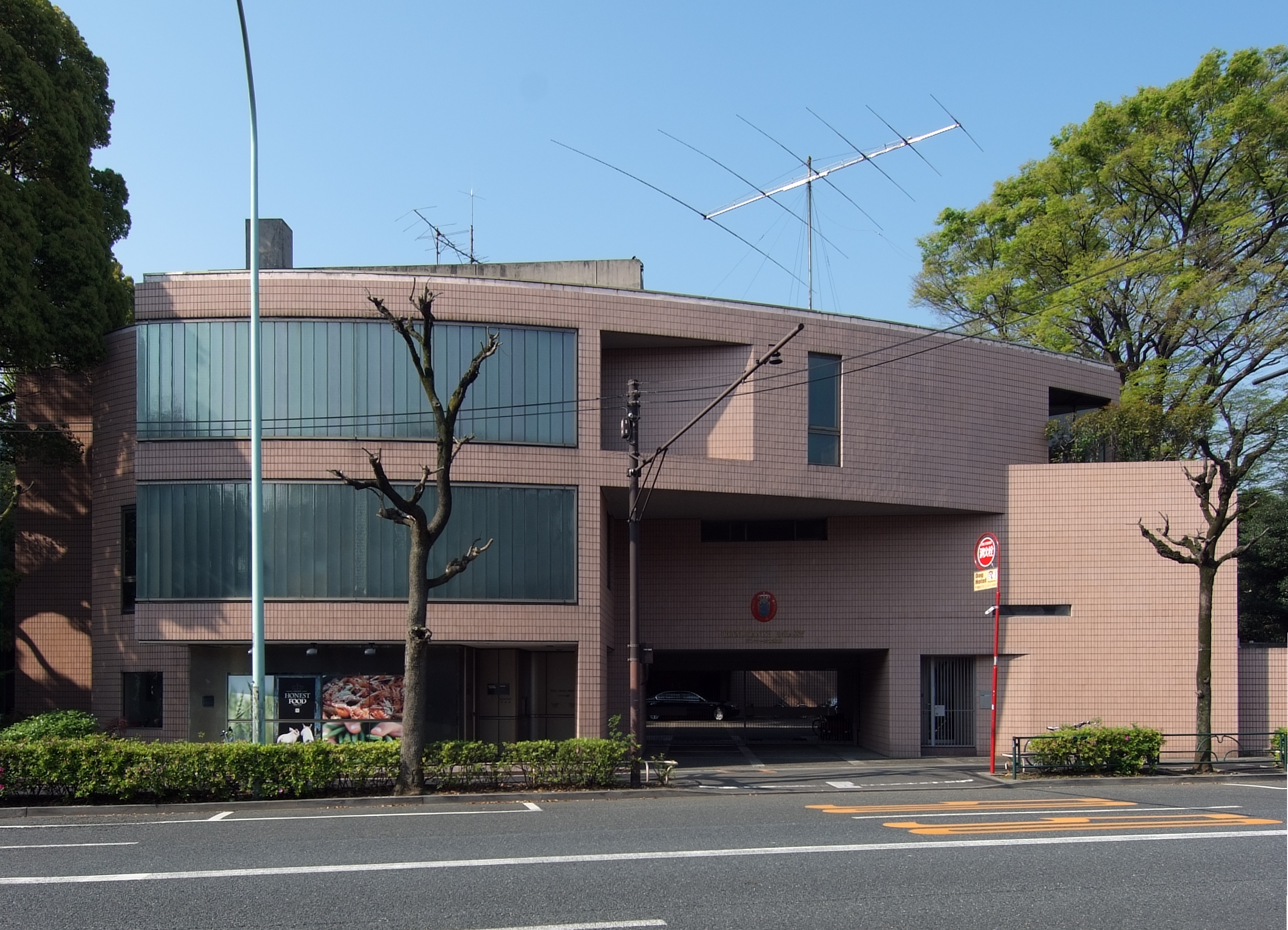 Royal Danish Embassy in Shibuya-ku Tokyo Japan, designed by Fumihiko Maki in 1979.